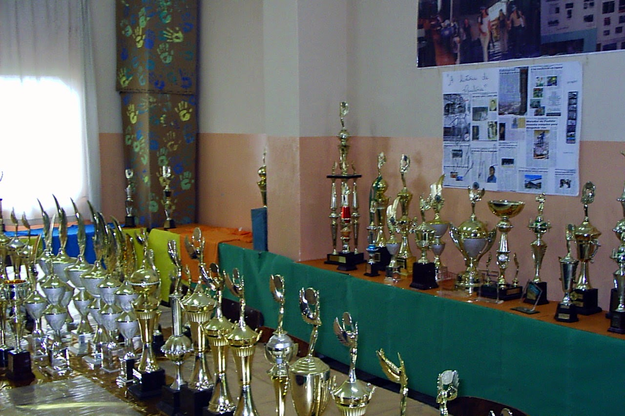 Centro de Memória "Neyde Marone" em 2004 - CEMEP - Paulínia/SP